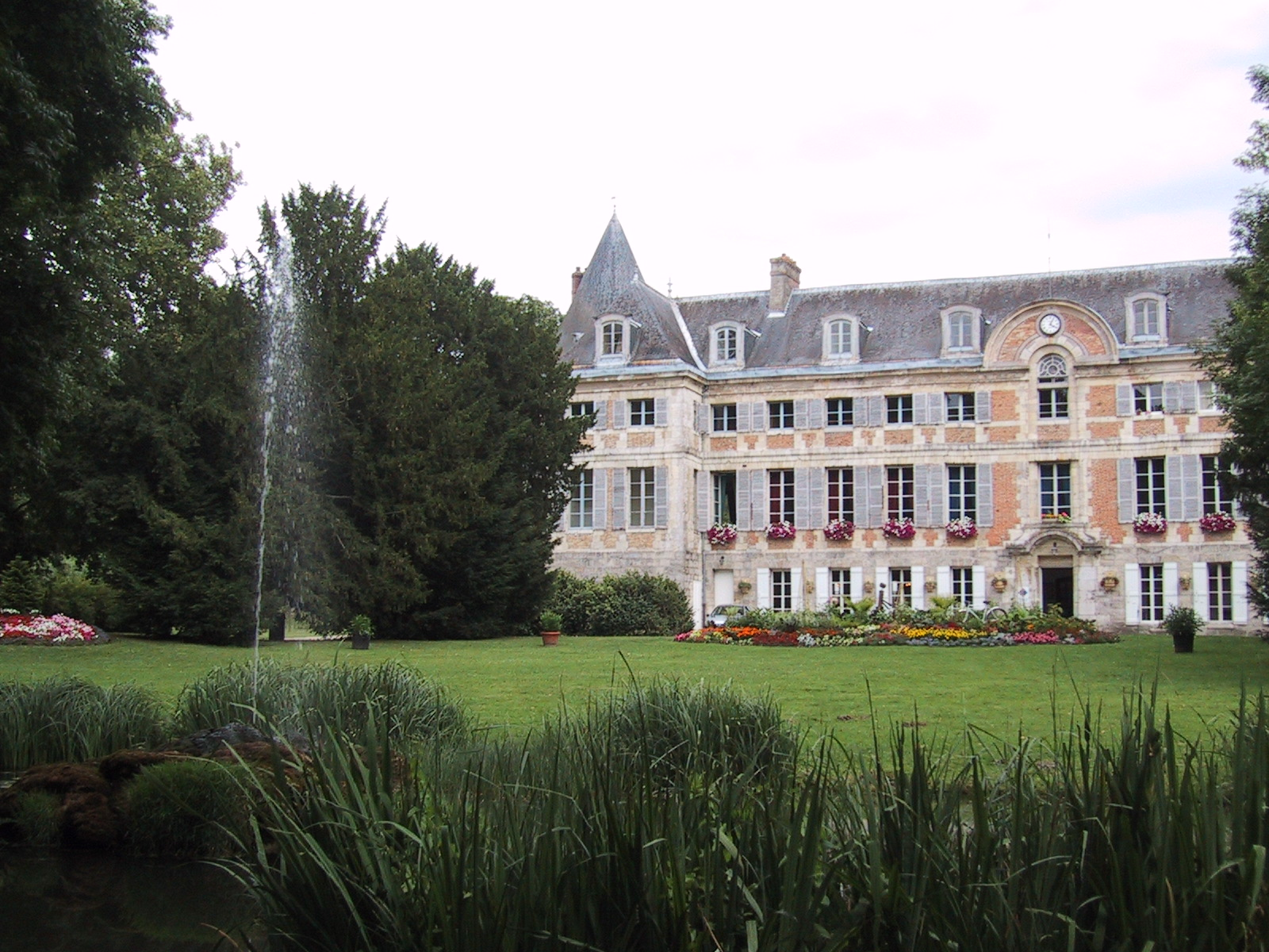 Château de Dormans (XIVe et XVII siècles). 2002 Jérôme SAUTRET